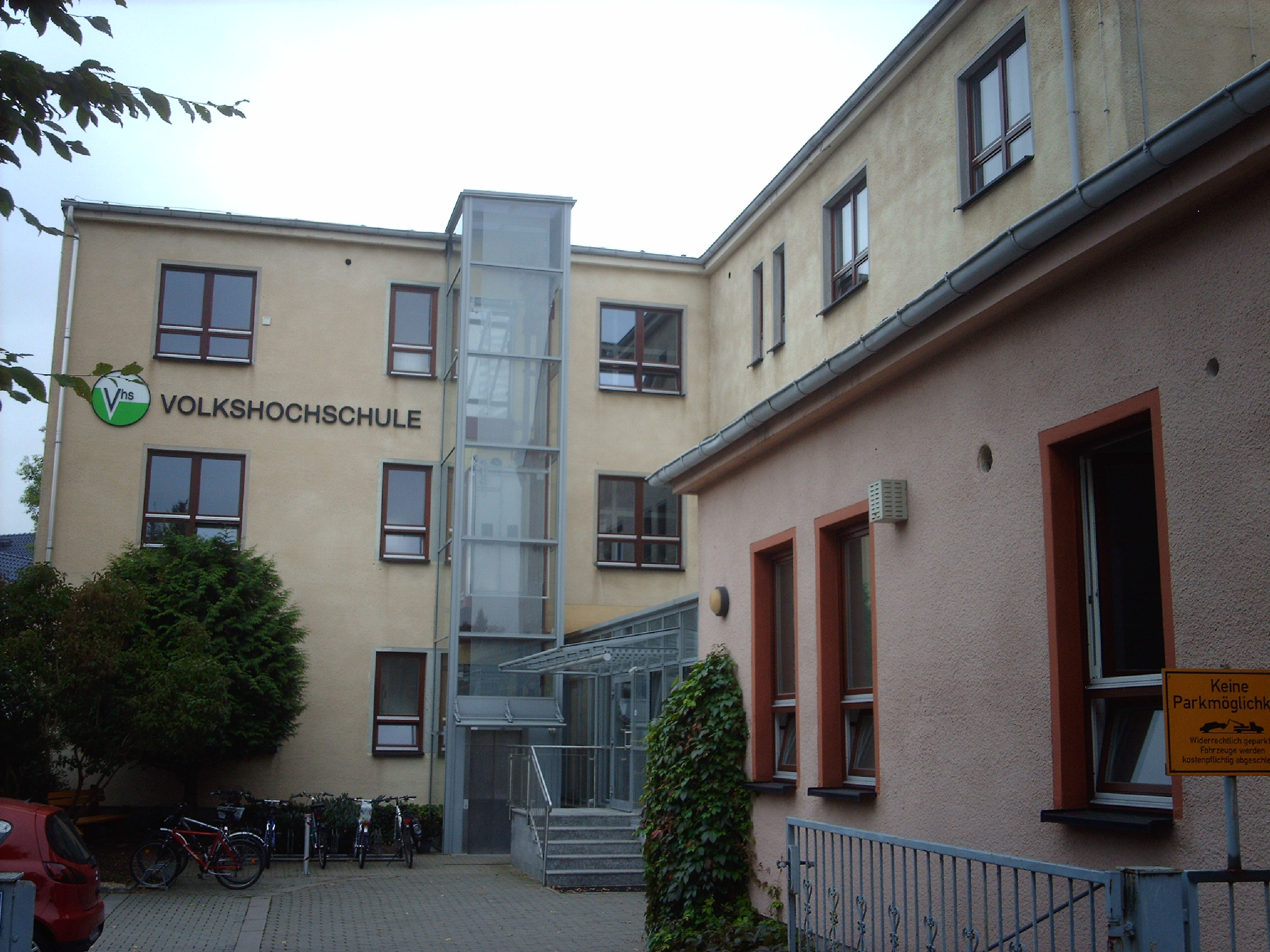 Volkshochschule Ilmenau Hofgebäude